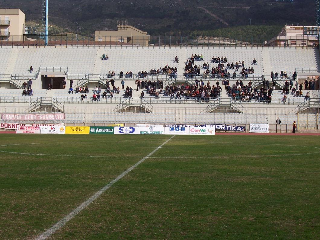 foto della vecchia grandinata (3.000 posti) dello stadio provinciale di Trapani